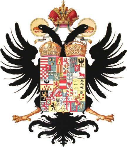 Mittleres Wappen ihrer Majestät Maria Theresia, römische Kaiserin, Erzherzogin von Österreich etc. etc.